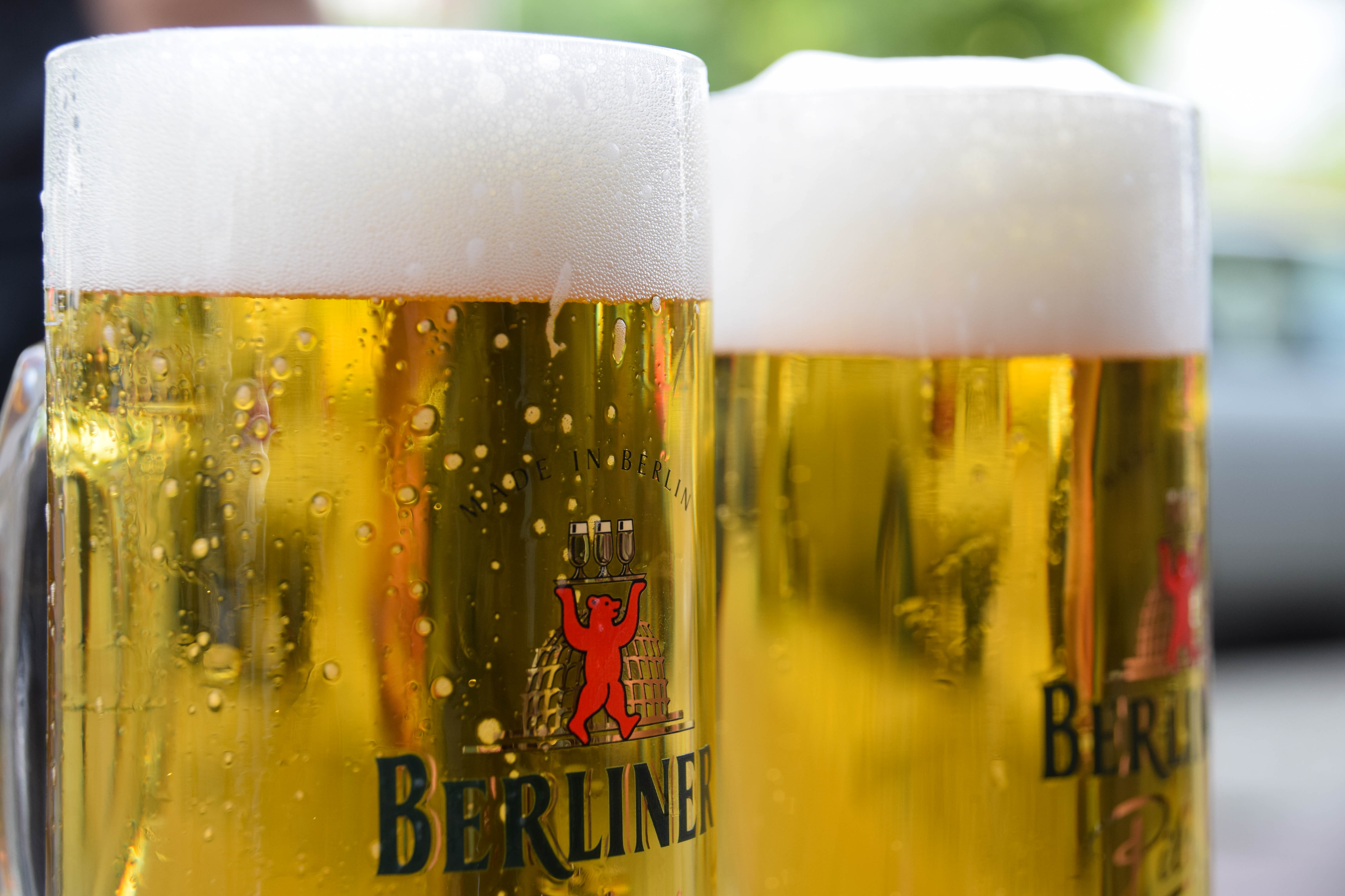 Frisch gezapftes Berliner Pilsner, hier im Café LebensArt, Lennestraße, Berlin, Germany.